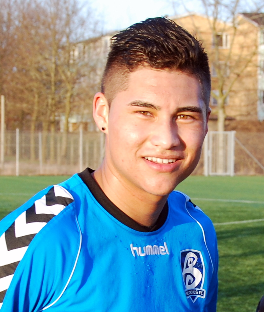 Fodboldspilleren Dustin Corea fra Blokhus FC. Her i en testkamp mod Viborg FF på VFFs træningsanlæg på Kirkebækvej i Viborg.